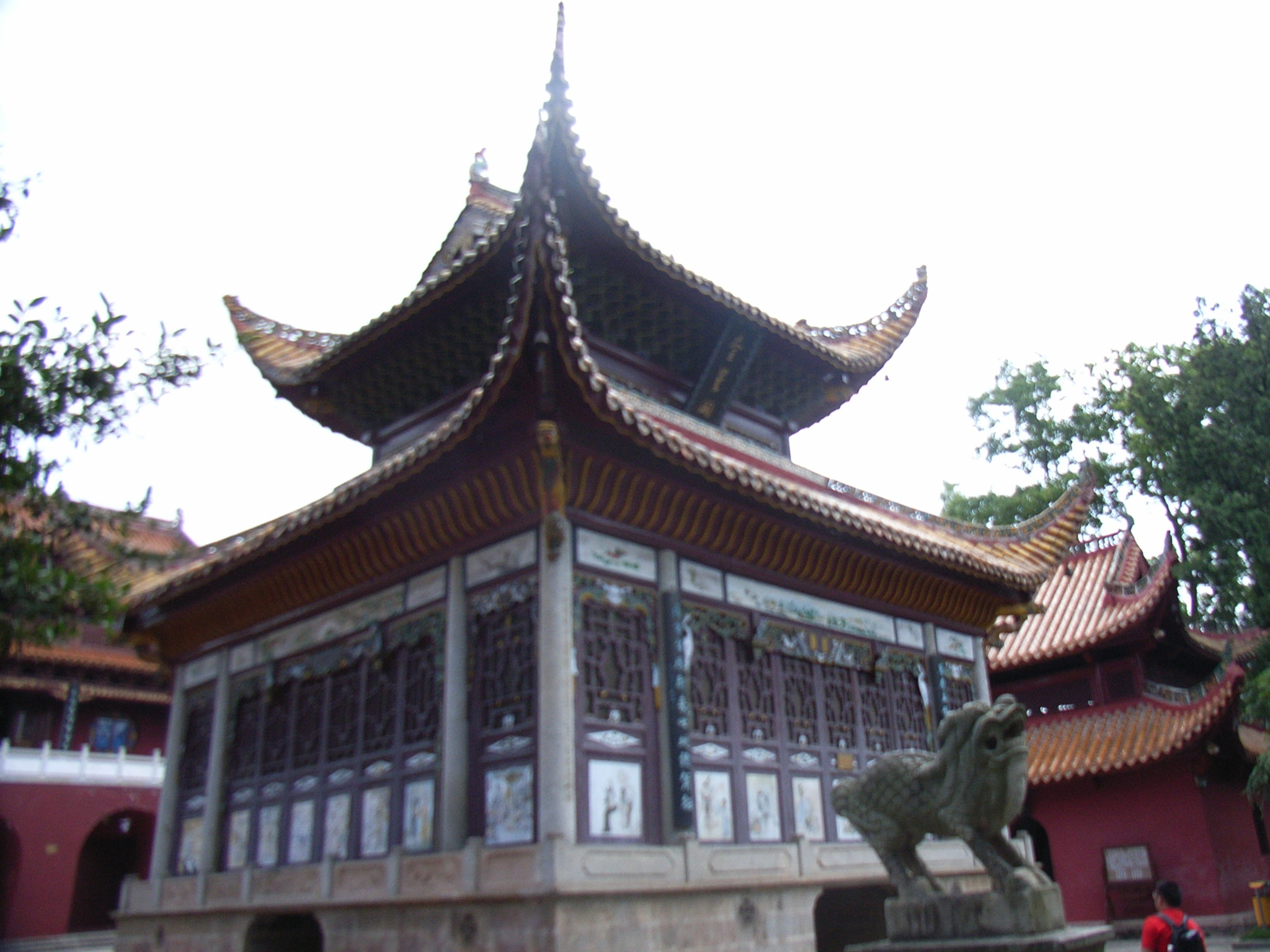 Nan Yue Da Miao temple, Héngshan, Hunan